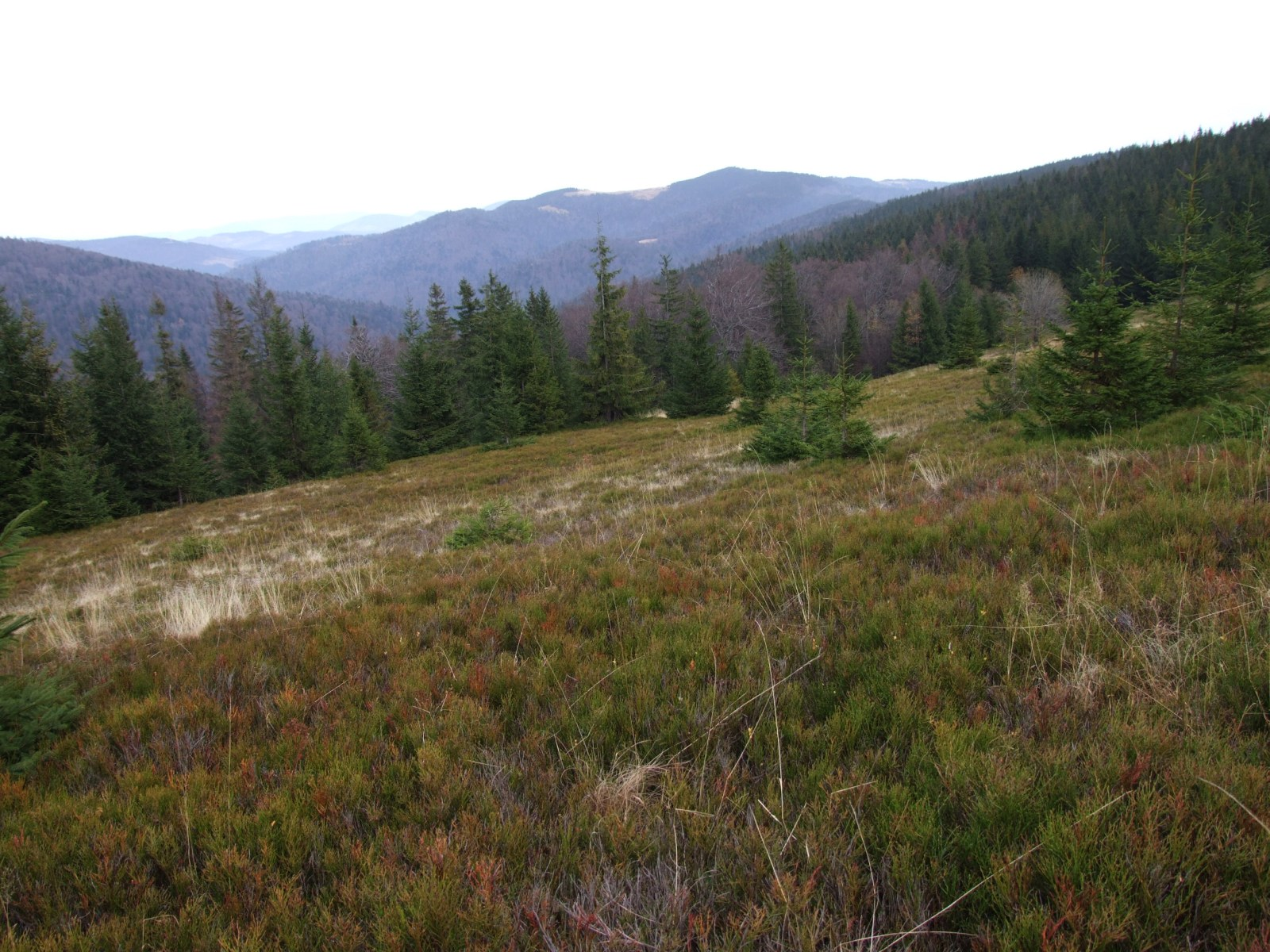 Polana Średniak w Gorcach. W głębi Gorc